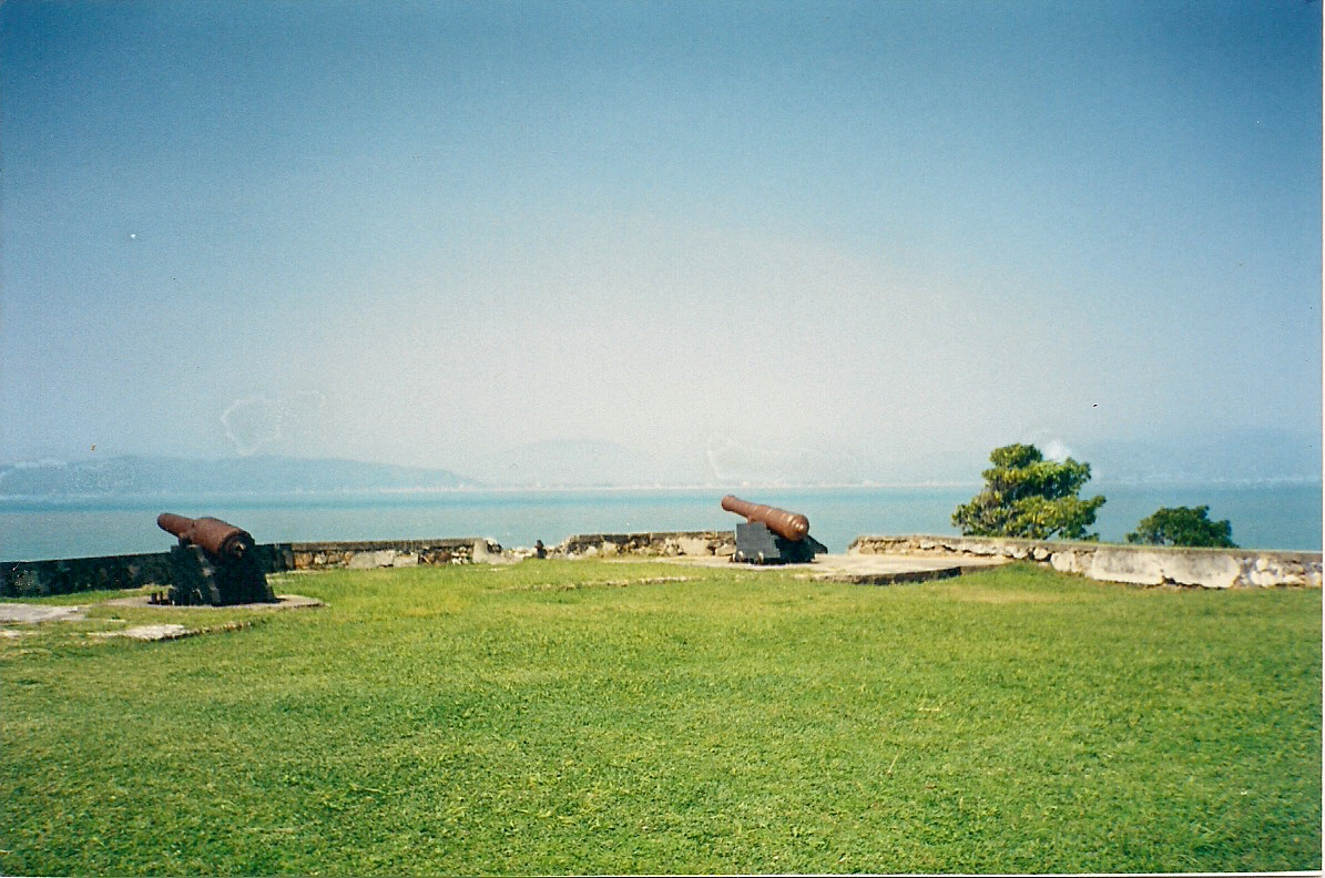 Fortaleza de Santa Cruz de Anhatomirim, ilha de Anhatomirim, SC, Brasil: aspecto de uma das baterias.